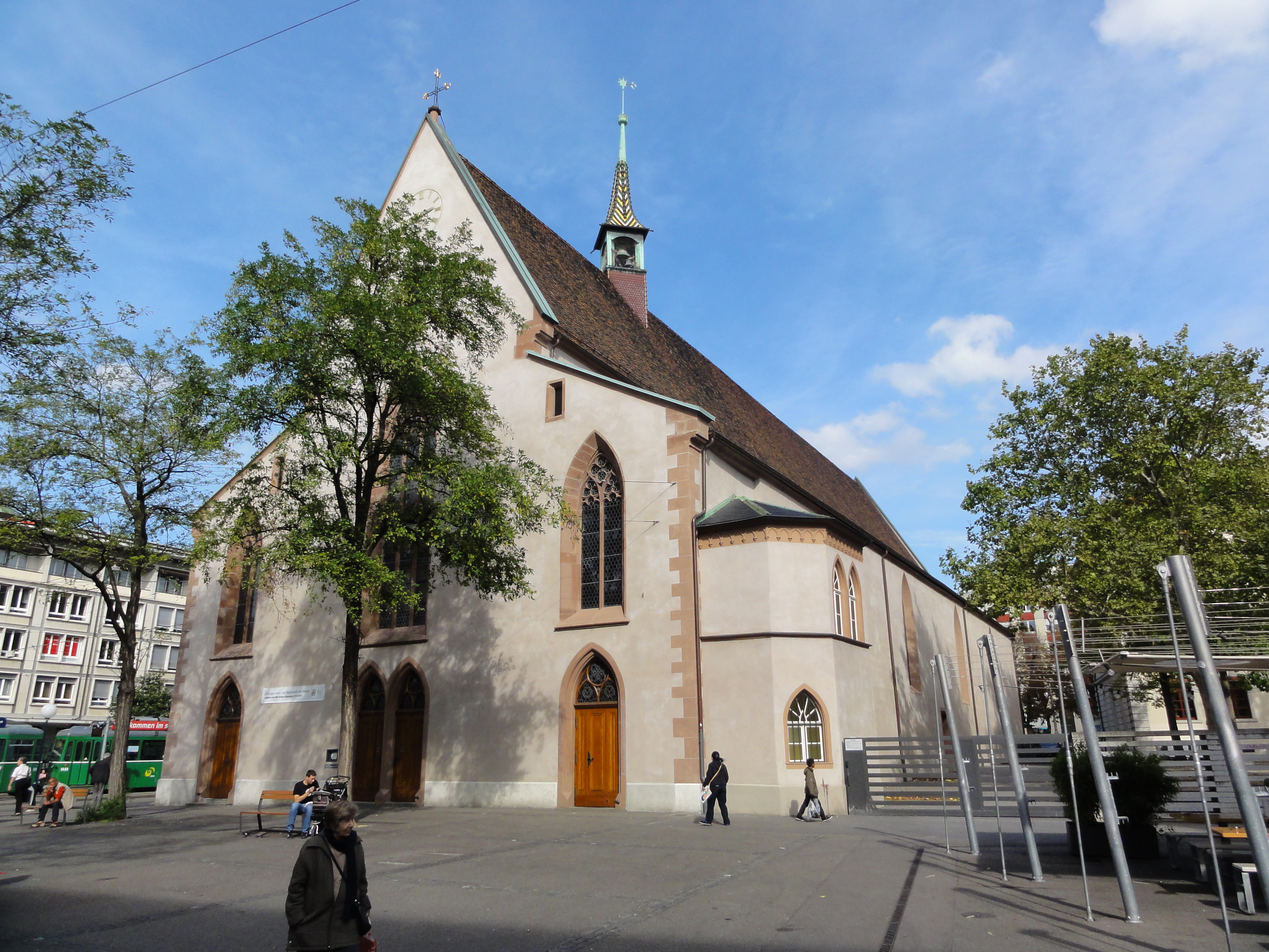 Basel – Clarakirche – Aussenansicht